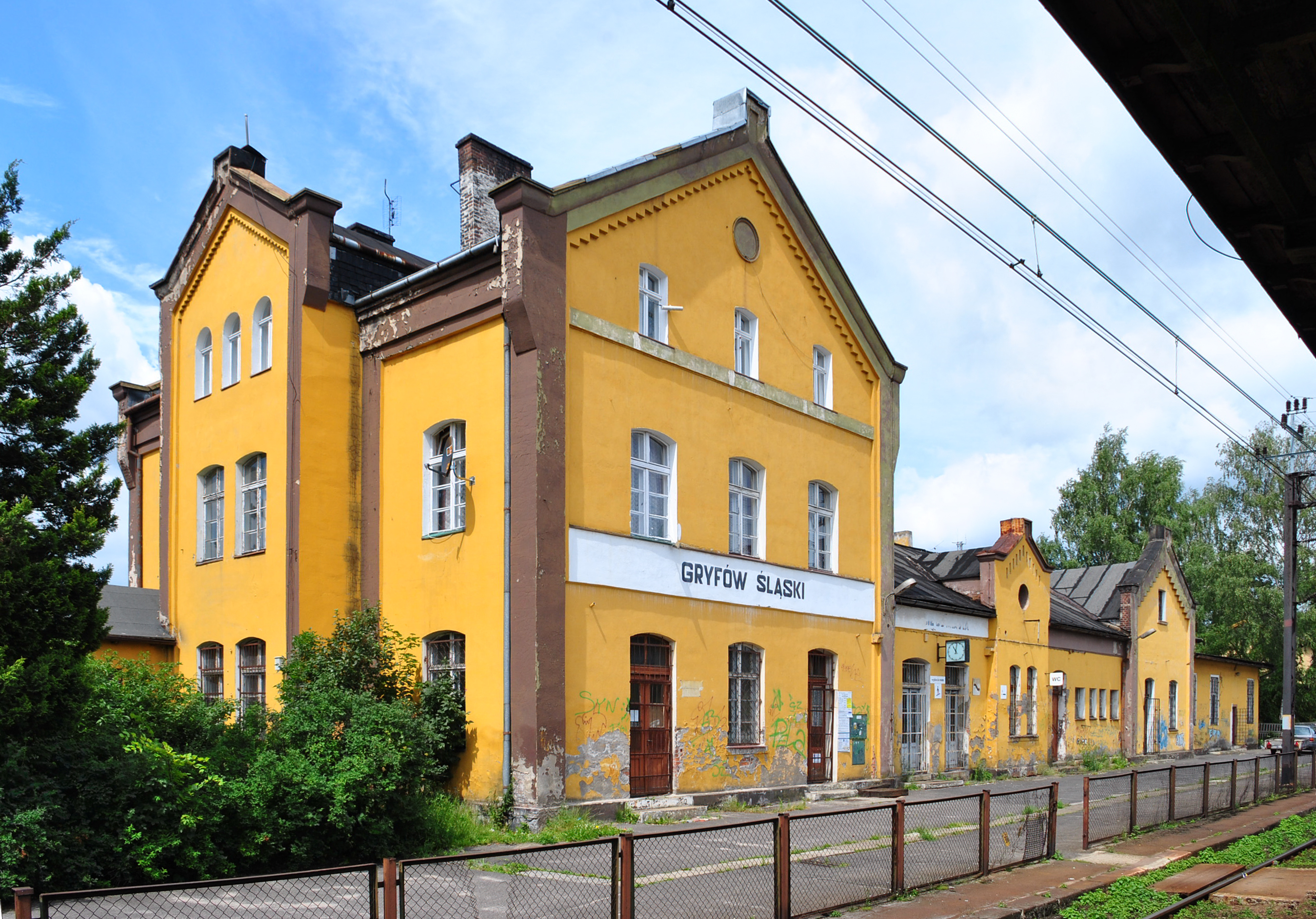 Budynek dworca na stacji Gryfów Śląski